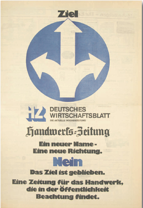 Eigenanzeige zur Umbenennung HZ/Deutsches Wortschaftsblatt